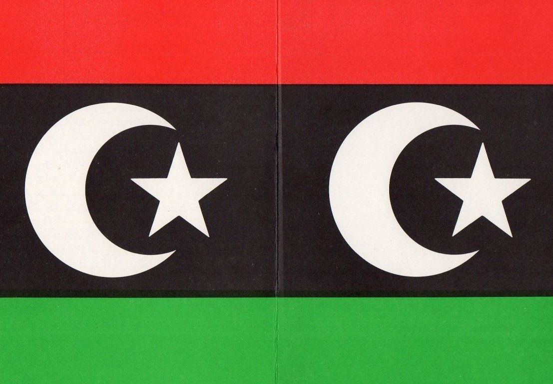 غلاف بطاقة الاعلان عن تأسيس الاتحاد الدستوري الليبي